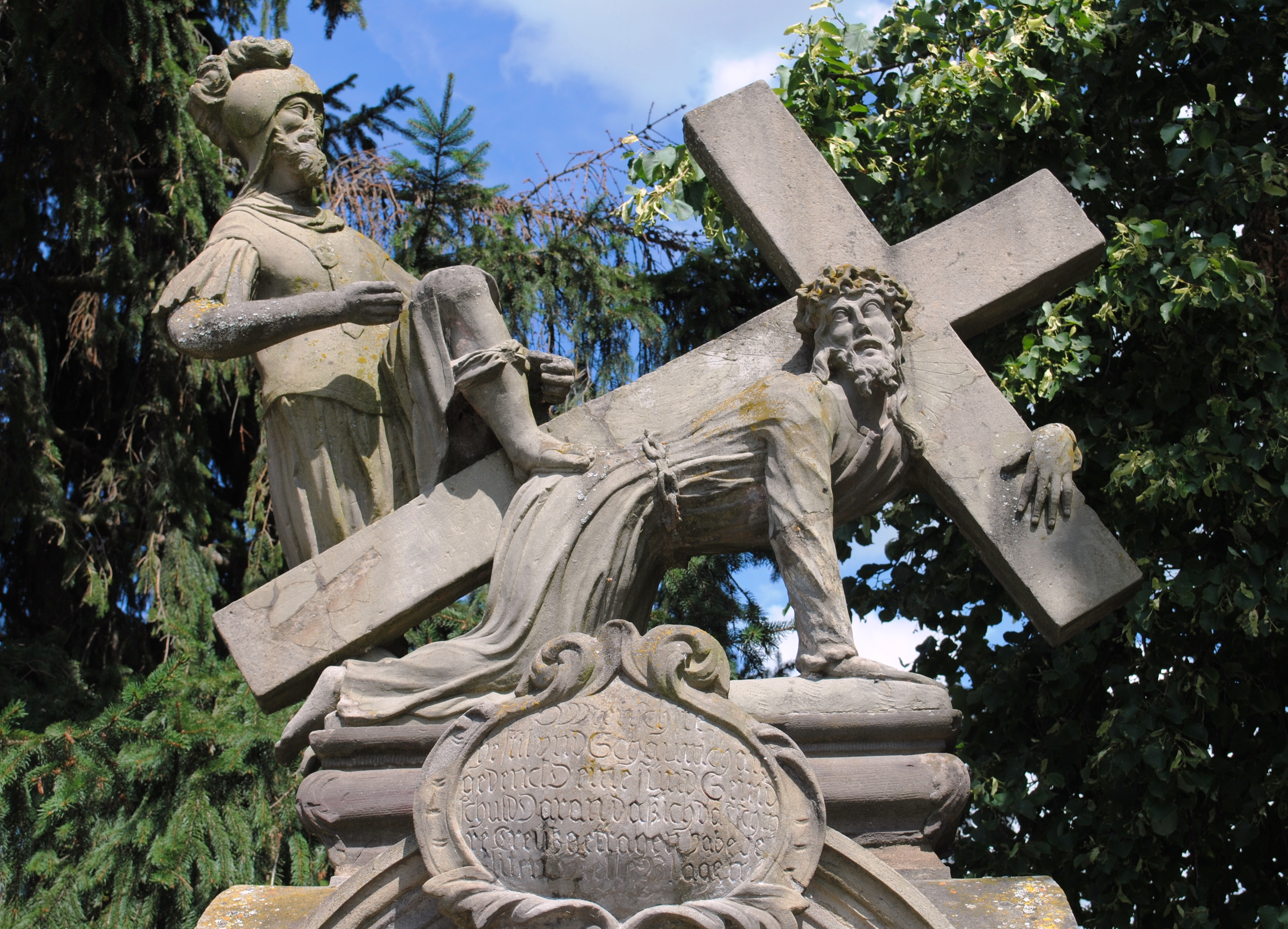 Kreuzschlepper, Tabernakelbildstock, Volkach-Obervolkach